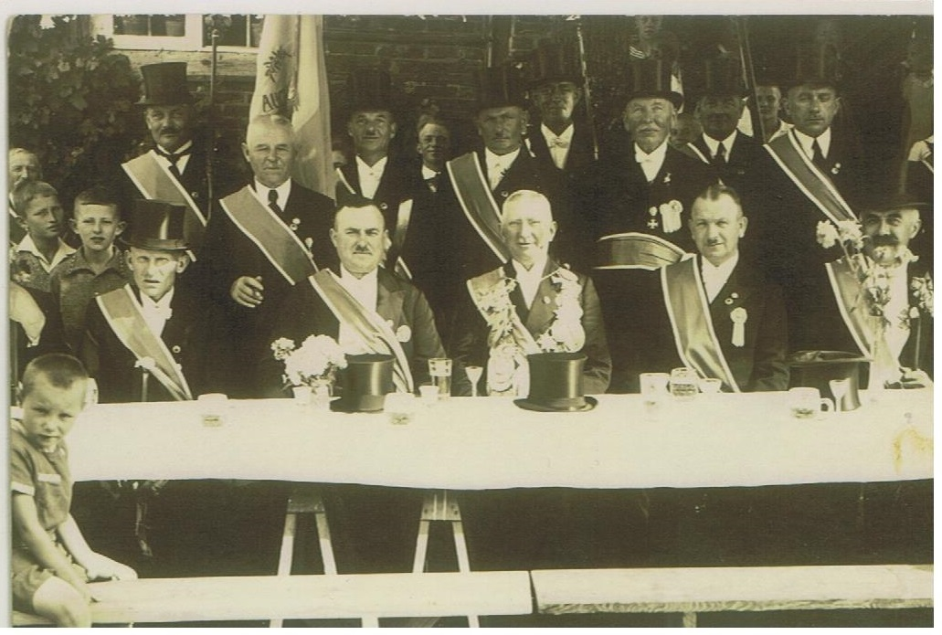 Vorstand der Dobbertiner Schützengilde im Kloster Dobbertin.